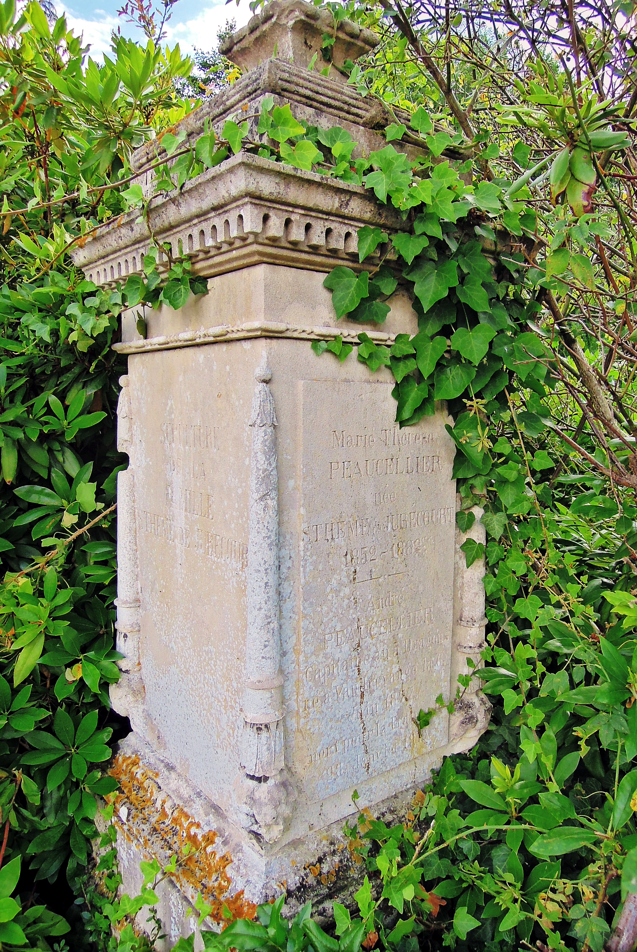 Grabstätte von Charles-Nicolas Peaucellier zweiter Frau in Wallerfangen. Der Grabstein trägt folgende vorn und rechts sichtbare Inschriften (andere befinden sich links): Marie-Thérèse Peaucellier née Sthème de JUBECOURT 1852-1882 André PEAUCELLIER Capitaine au 5Dragons né a Vaudrevange la 6 Juin 1877 mort pour la France le 28 Janvier 1915